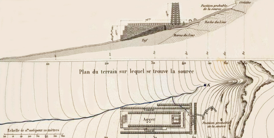 Plan des travaux romains à Uxellodunum se trouvant dans le livre : Napoléon III, Histoire de Jules César, tome 2 - planche 30 (extrait) - 1866